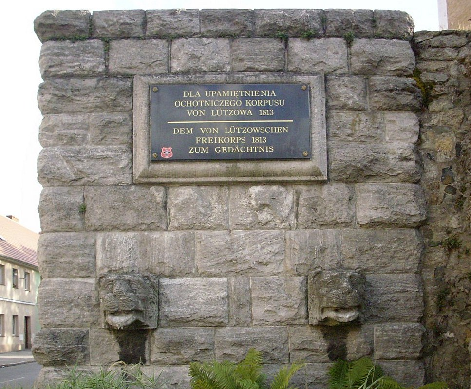 Tablica upamiętniająca ochotniczy korpus Ludwiga von Lützowa. Autorem pomnika przedstawiającego jeźdźca na koniu, który stał na zachowanym cokole był wrocławski rzeźbiarz Theodor von Gosen.